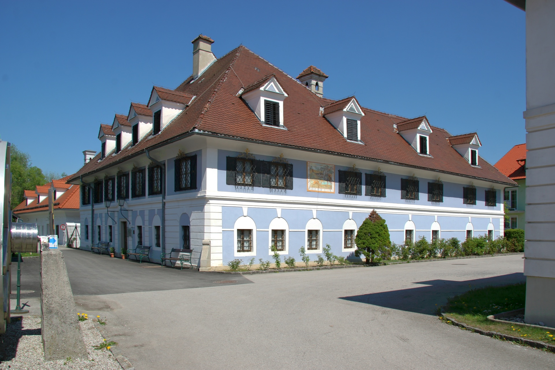 Herrenhaus der ehemaligen Sensenschmiede am Gries, heute OÖ. Sensenschmiedemuseum